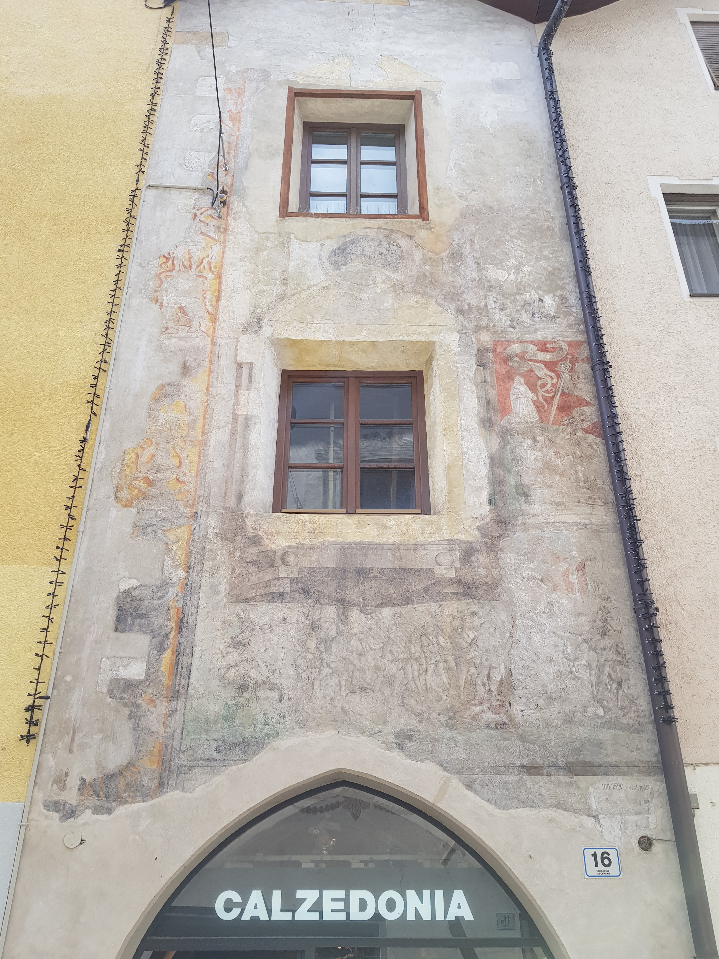 Haus Stadtgasse 16, Bruneck, Südtirol